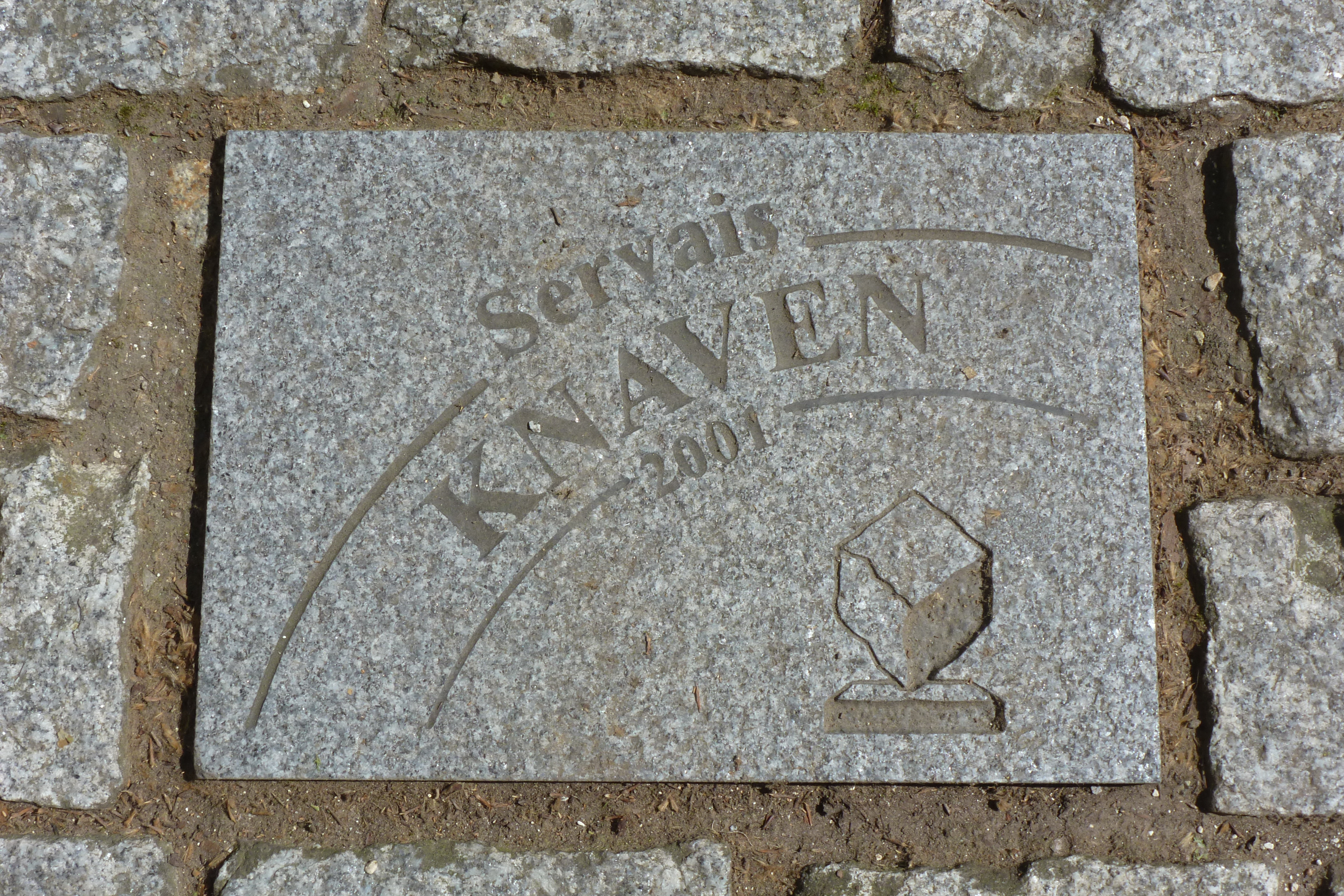 Pflasterstein für Servais Knaven auf der Allée Charles Crupelandt in Roubaix